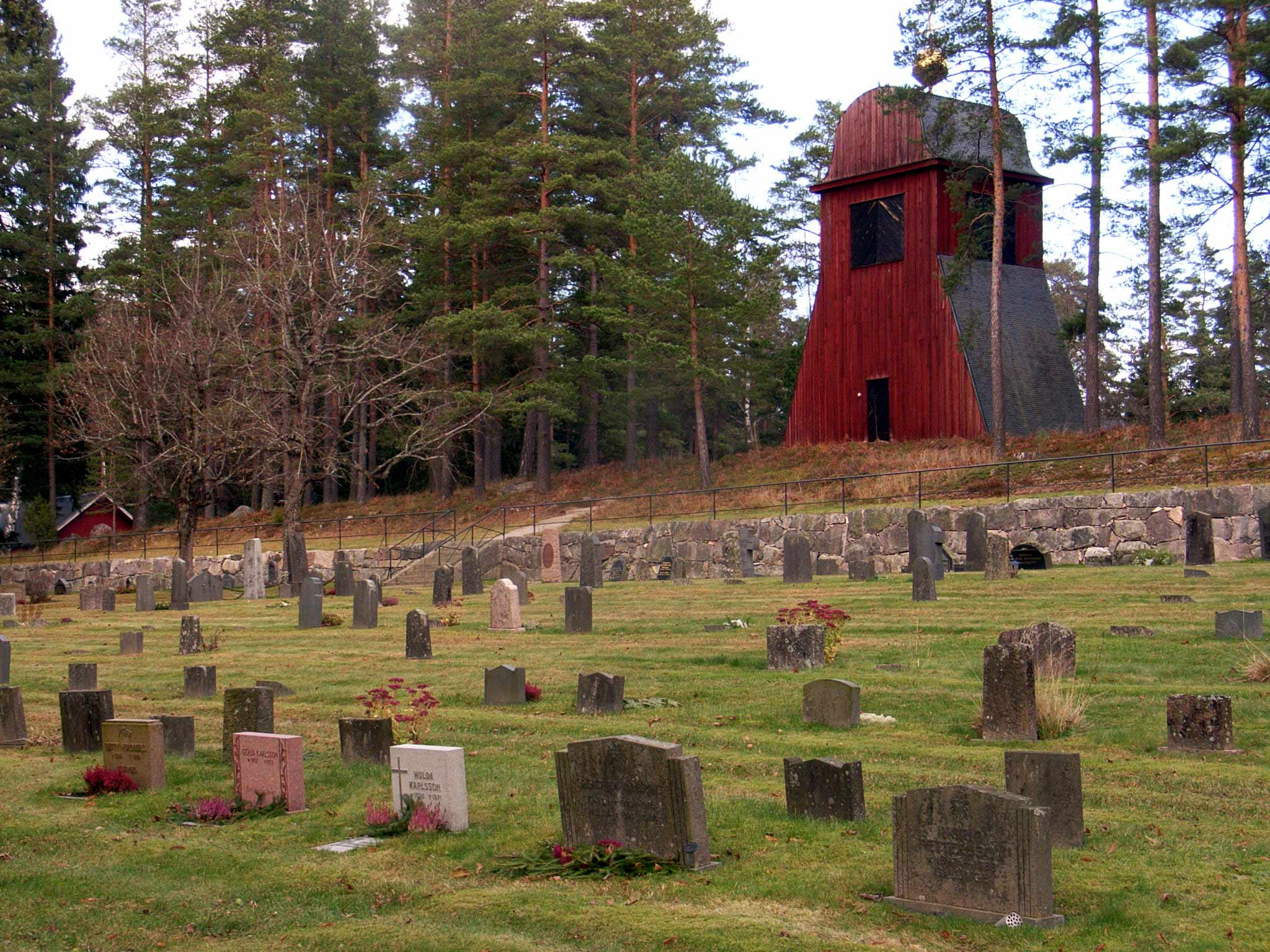 Spannarboda kyrkogård